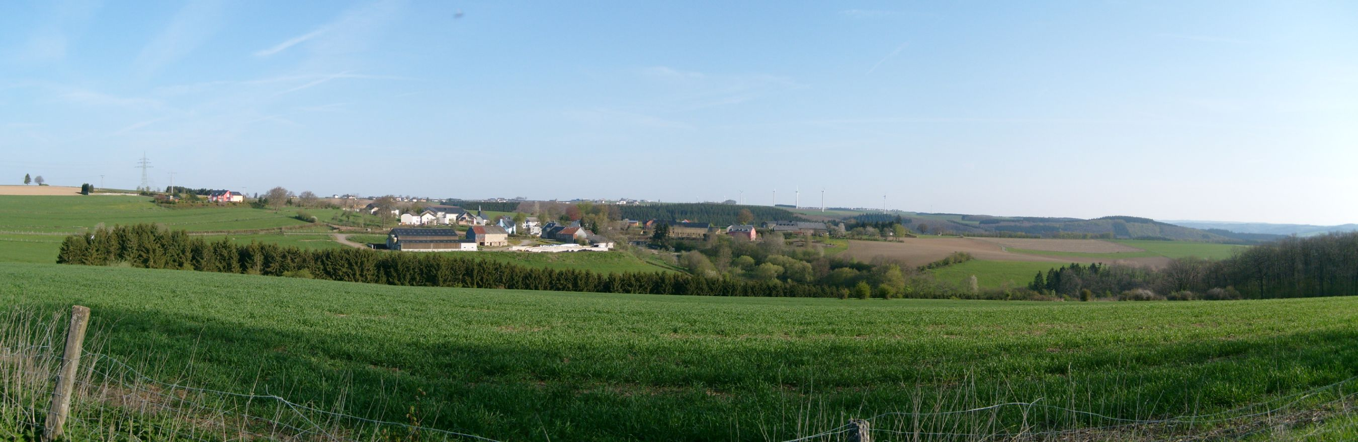 Sujet: Vue vu SÃ¼den op Rueder, 2. Mee 2008 Auteur: User:PlayMistyForMe Source: eege Foto